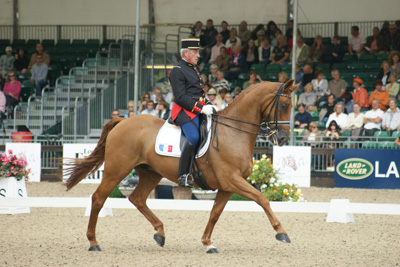 Diabolo Saint Maurice et Hubert Perring au Grand Prix Dressage à Windsor, le 25 aoüt 2009